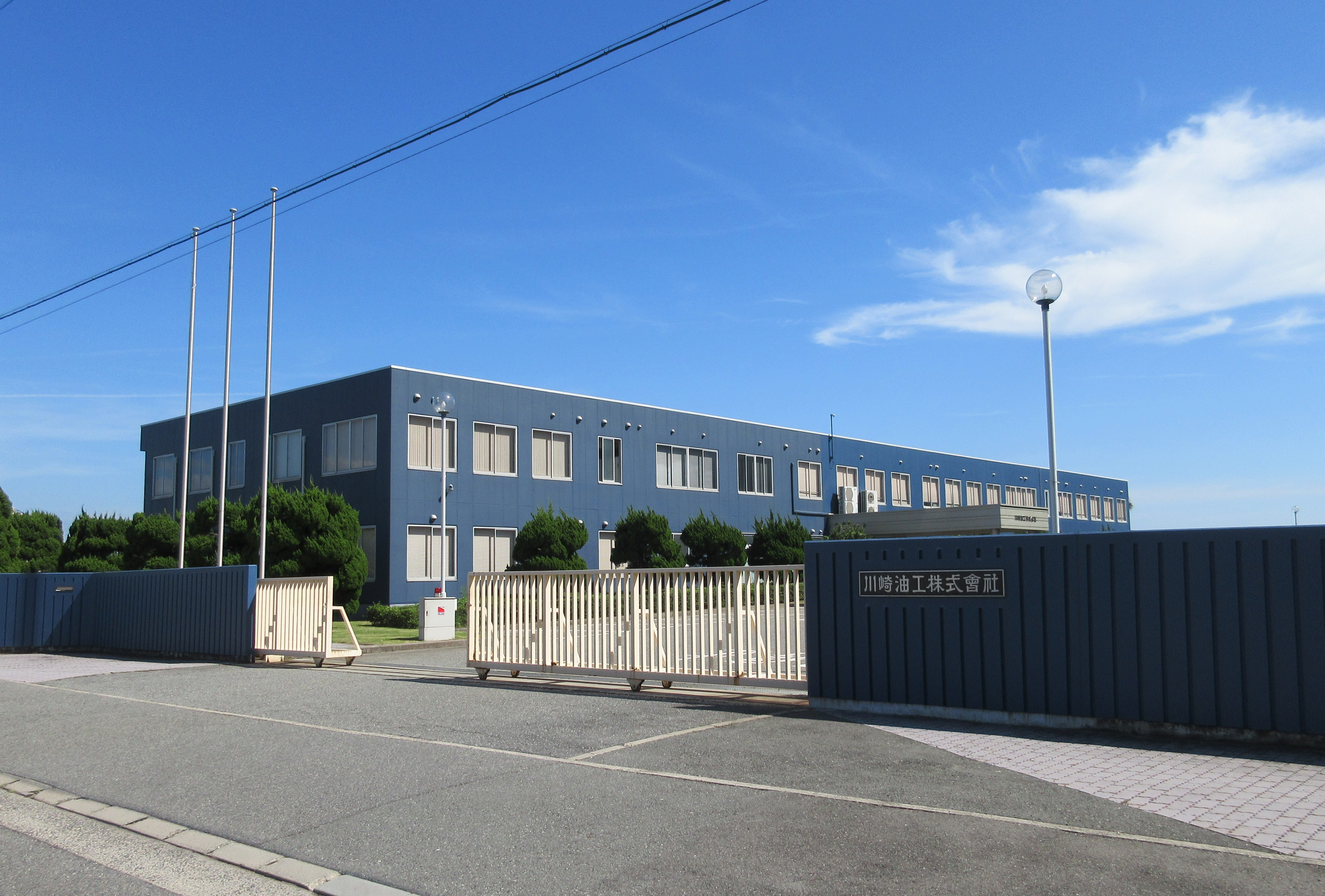 川崎油工本社